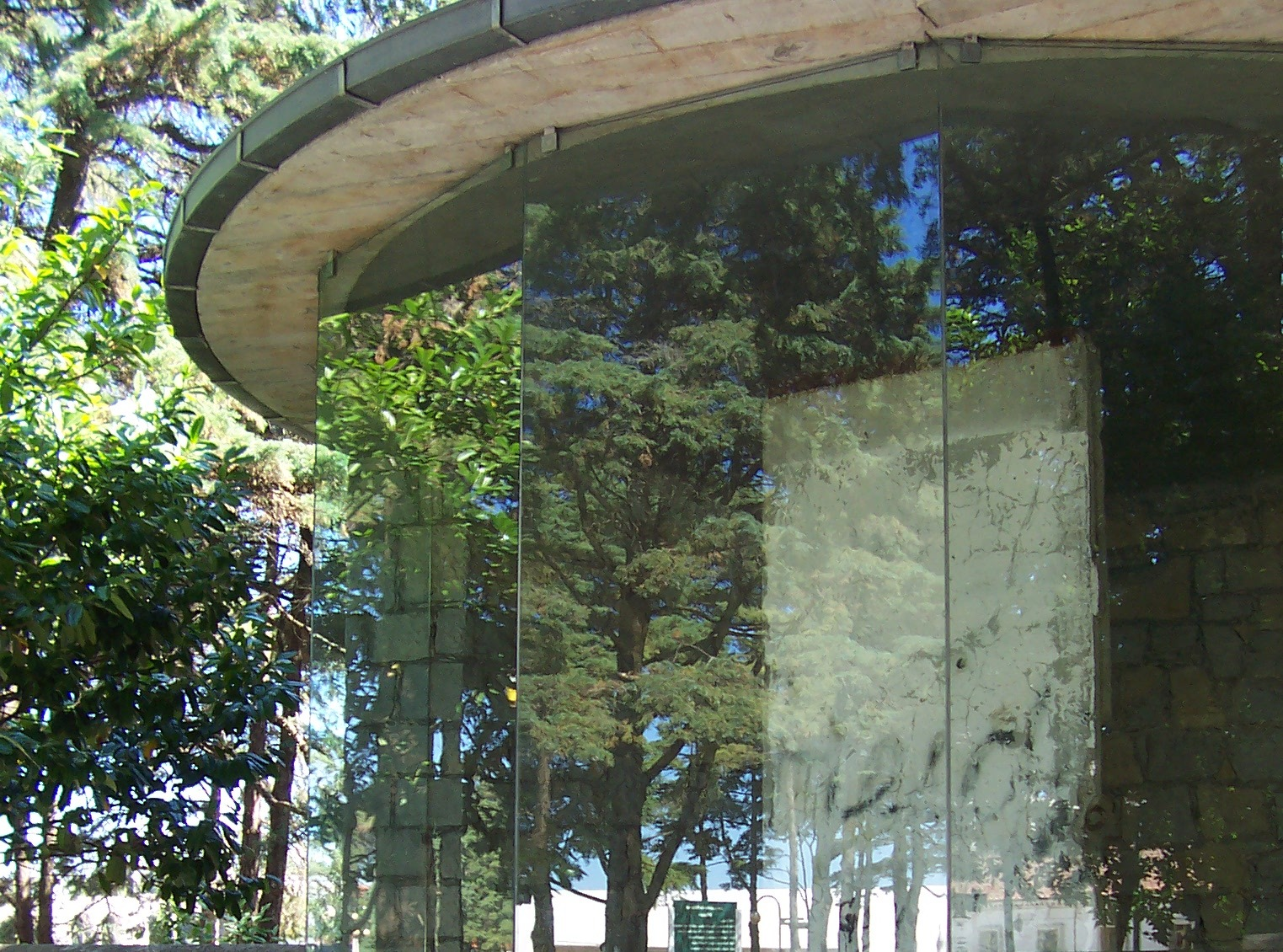 Esta foto participó en Otro lugar de flickr